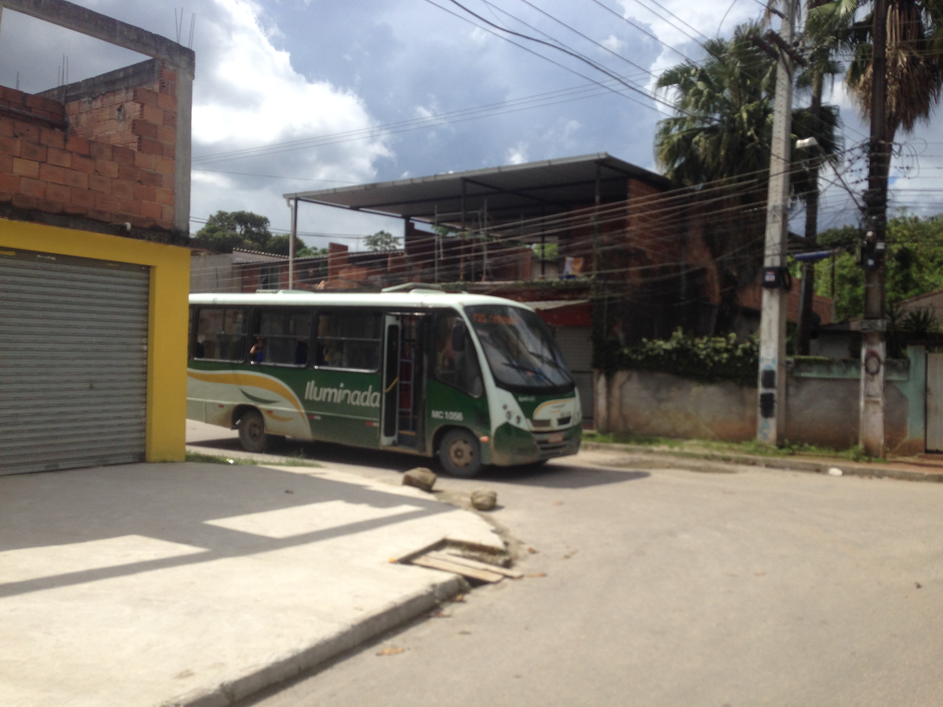 Fotografia registrando transporte público em Vila Recreio (Magé).